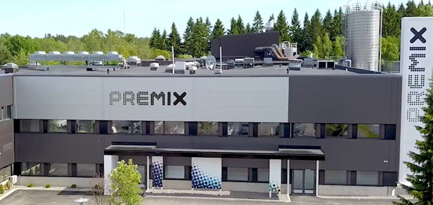 Ilmakuva Premixin pääkonttorista Rajamäeltä